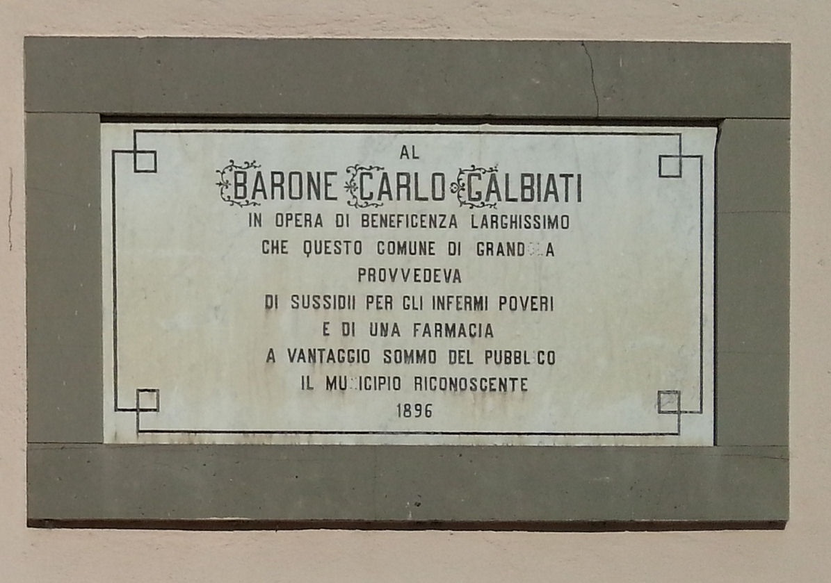 Chiesa di San Siro (Codogna)